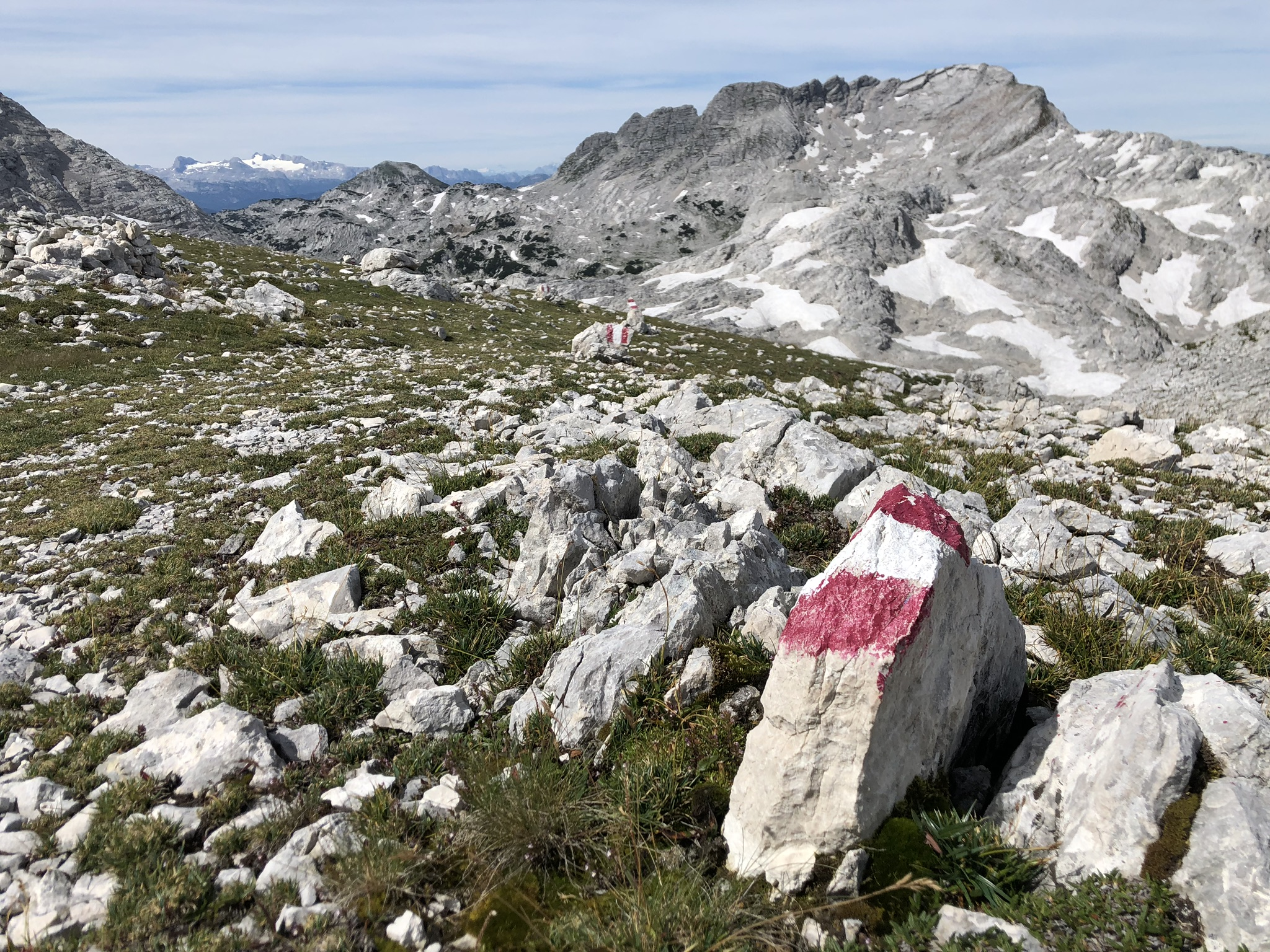 Deitsch: Blick zum Rotgschirr vom Temlbergsattel aus